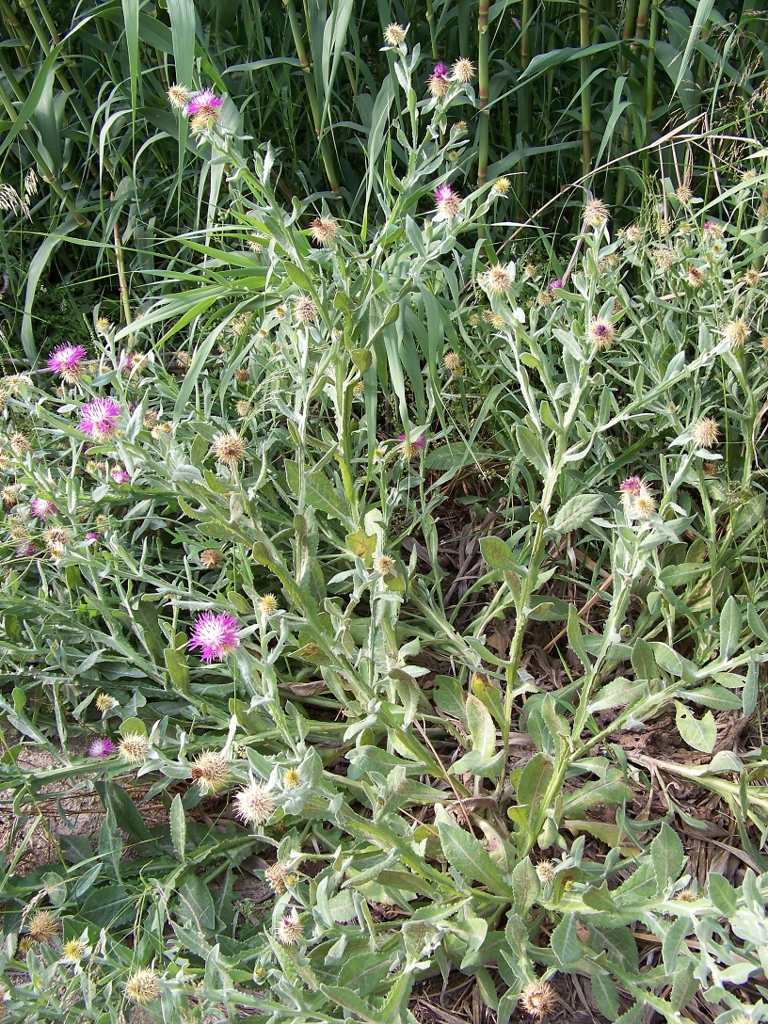 Centaurea seridis : Vista general - Camino de la Acequia de Cox, Albatera (Alicante, España).